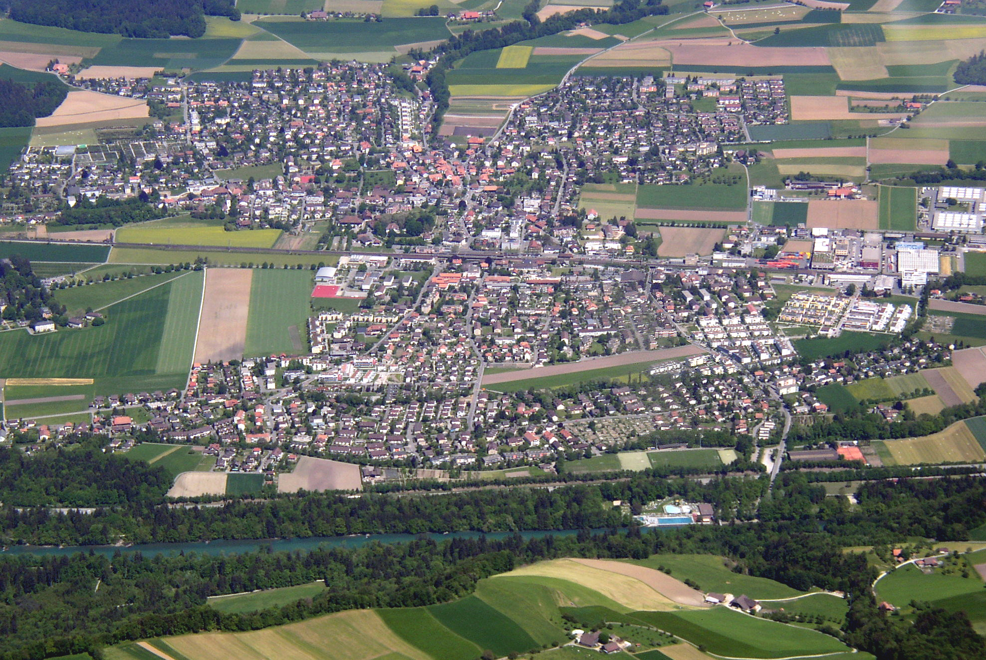 Münsingen von oben